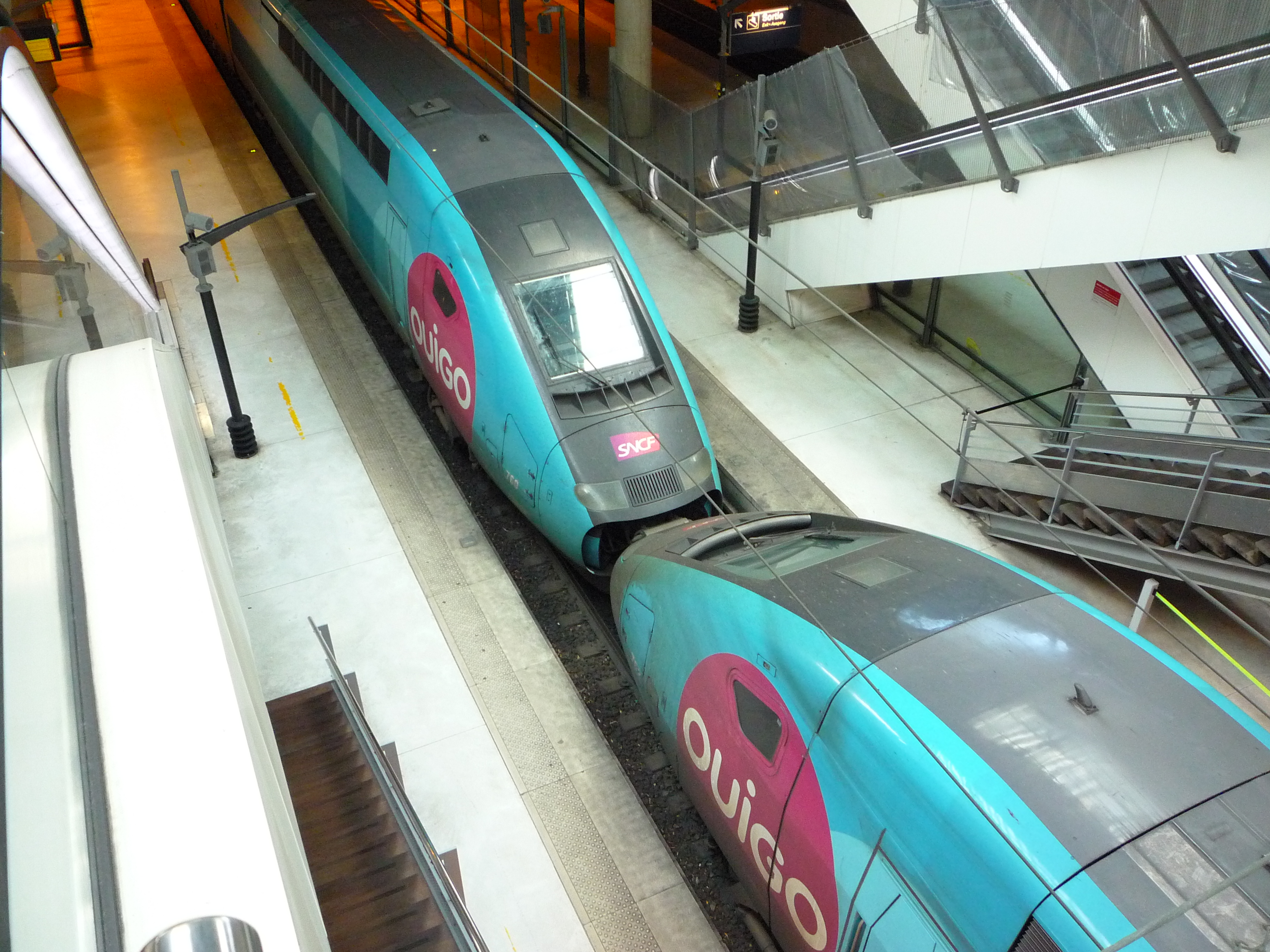 Les rames 760 et 762 en livrée OuiGo à Marne-la-Vallée–Chessy TGV, qui assurent le train n°6275 à destination de Lyon–Part-Dieu. (375L7031)